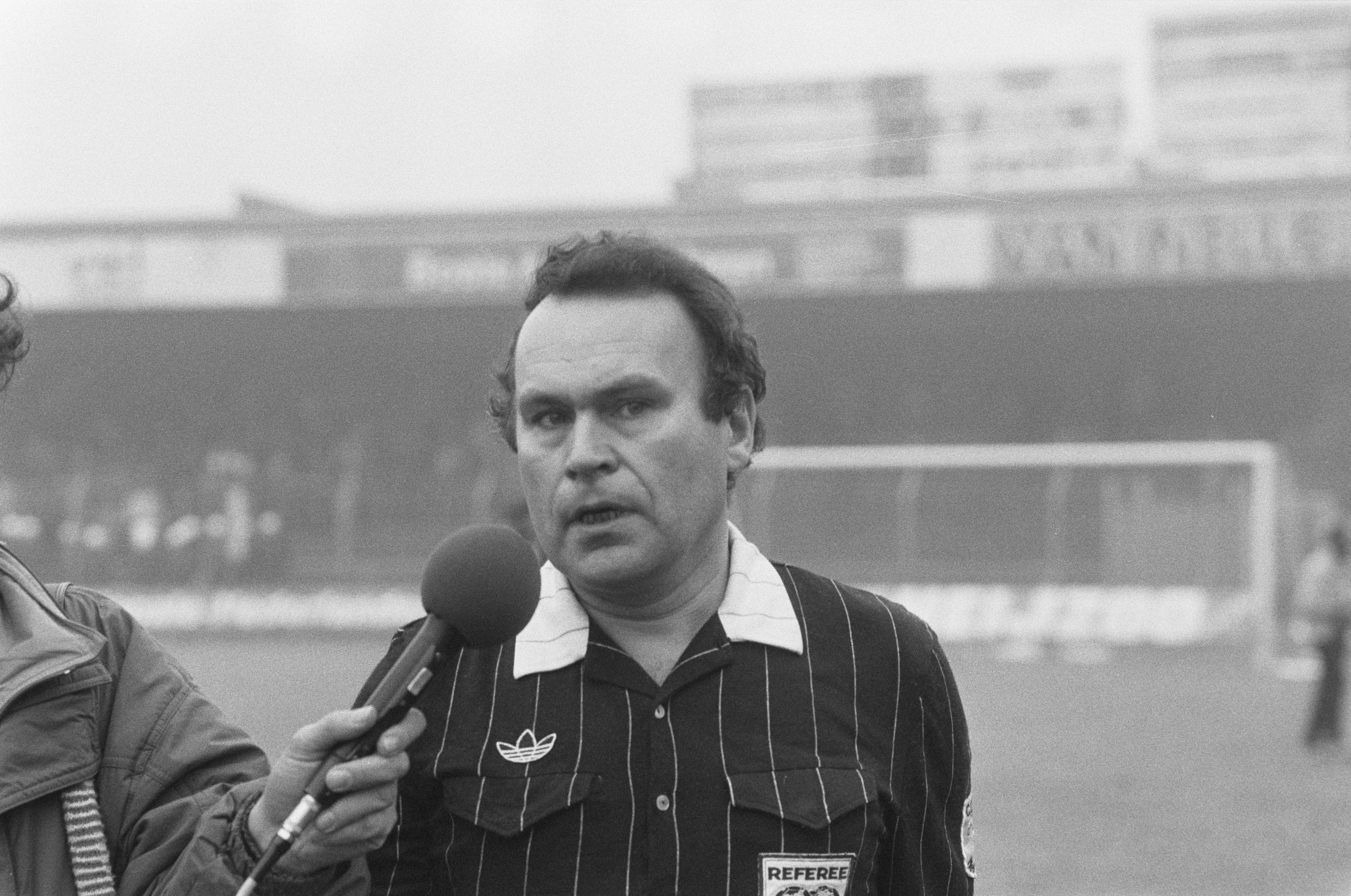 Collectie / Archief : Fotocollectie Anefo Reportage / Serie : [ onbekend ] Beschrijving : Supportersrellen tijdens Den Haag tegen Ajax in Den Haag ; scheidsrechter Van Ettekoven wordt geinterviewd Locatie : Den Haag, Zuid-Holland Trefwoorden : rellen, scheidsrechters , sport, supporters, voetbal Persoonsnaam : Ettekoven van Instellingsnaam : FC Den Haag Fotograaf : Molendijk, Bart / Anefo Auteursrechthebbende : Nationaal Archief Materiaalsoort : Negatief (zwart/wit) Nummer archiefinventaris : bekijk toegang 2.24.01.05 Bestanddeelnummer : 933-9089